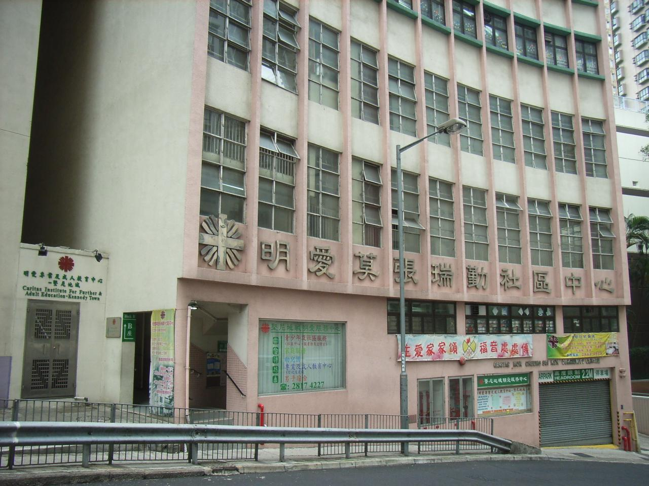 明愛專業及成人教育中心(堅尼地城) Cato